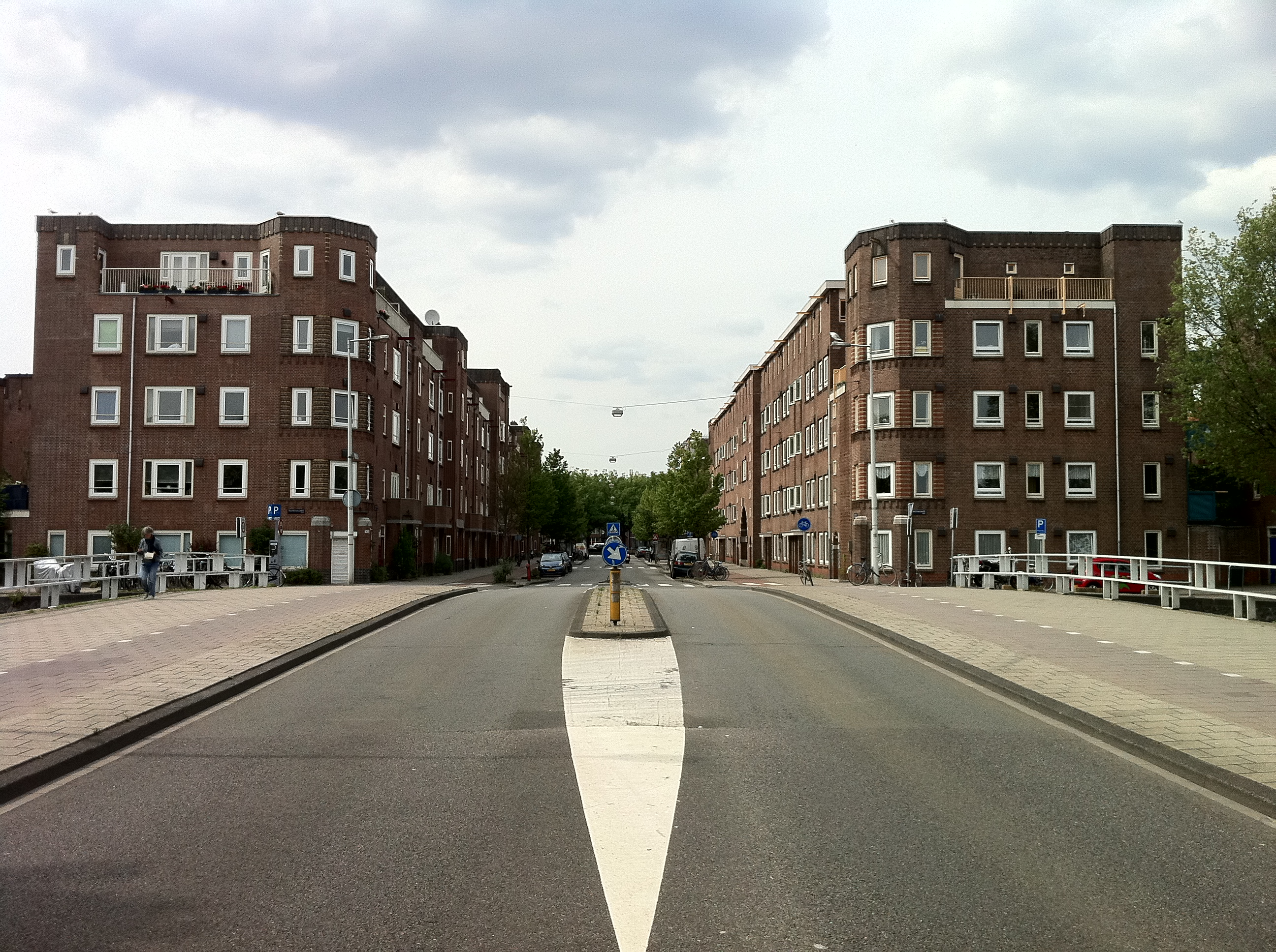 Transvaalkade, gemeentewoningen in Transvaalbuurt van architect Jan Gratama aan de Schalk Burgerstraat; brug op voorgrond werd in 2016 vernoemd: Kaap de Goede Hoopbrug; brug 256